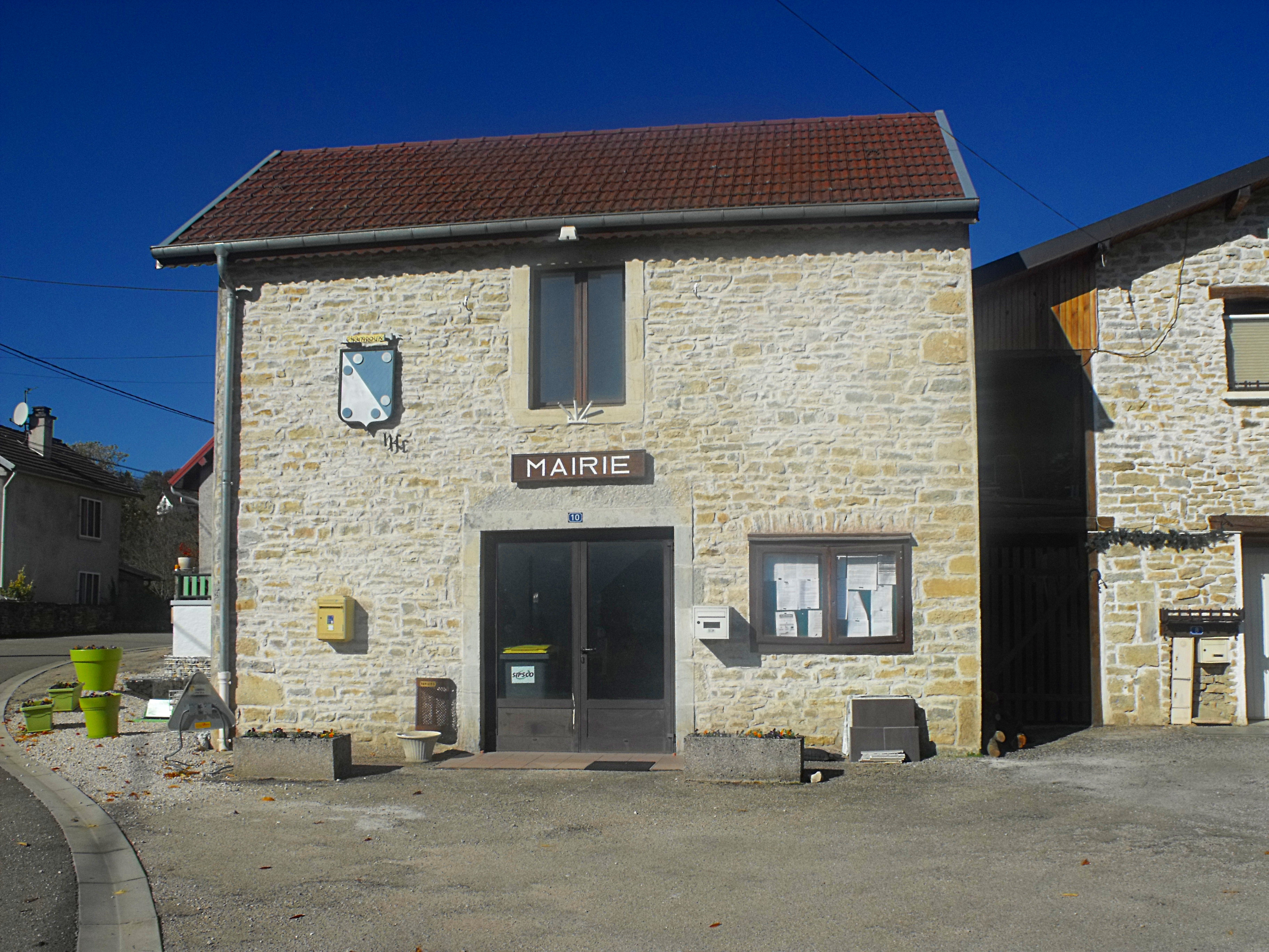 Mairie de Champoux, Doubs, France